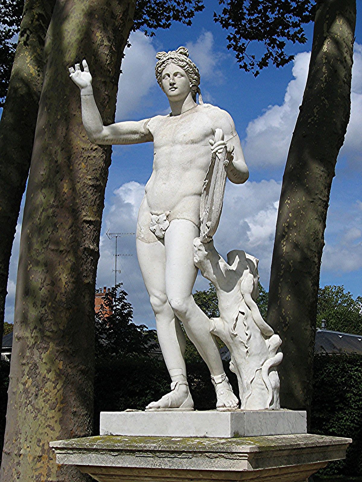 Statue d'Appolon, dans la demi-lune du bassin d'Apollon du Park de Versailles.